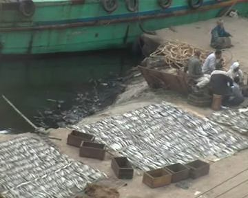 roseta - une bonne peche